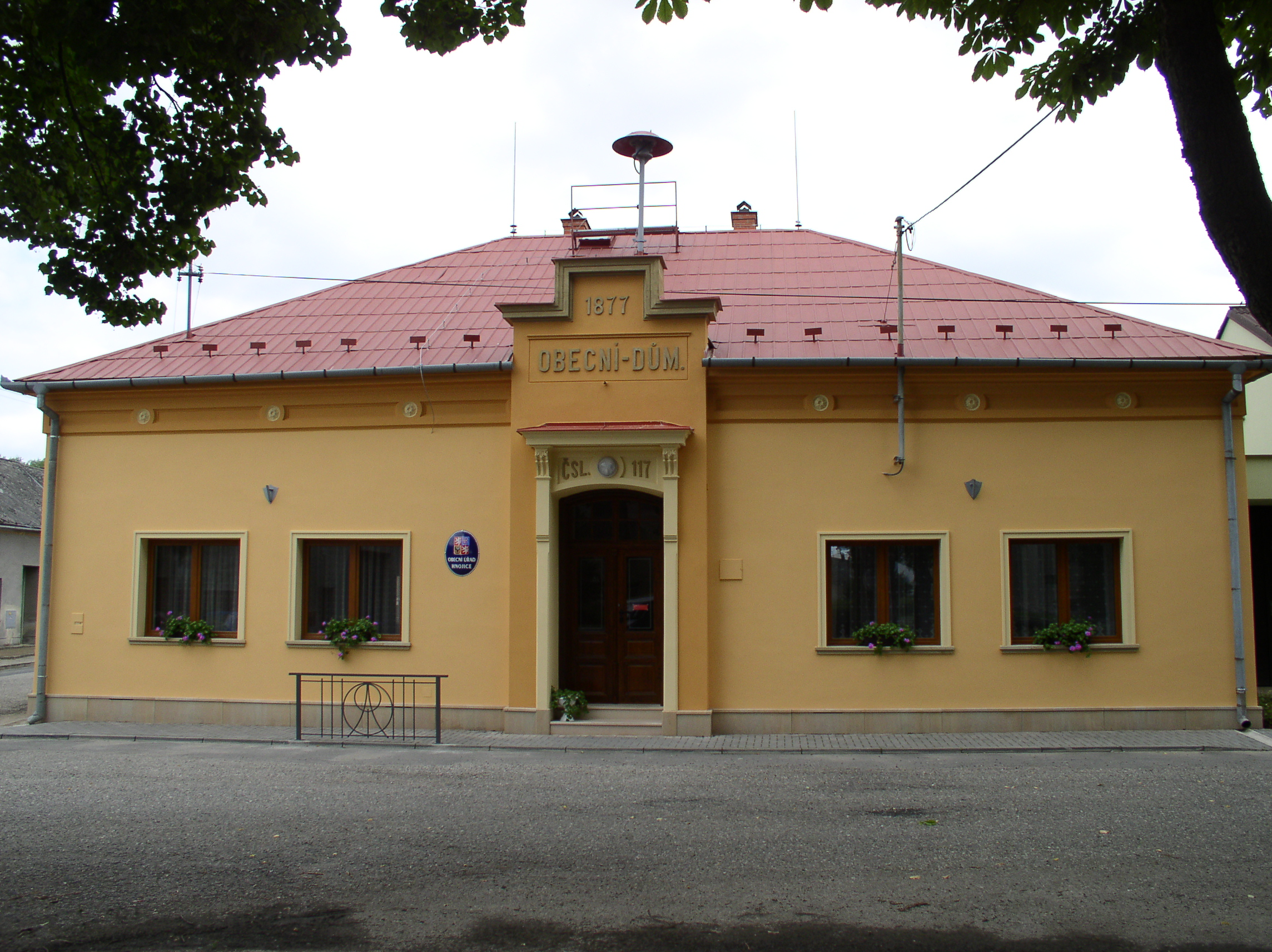 Obecní úřad Hnojice